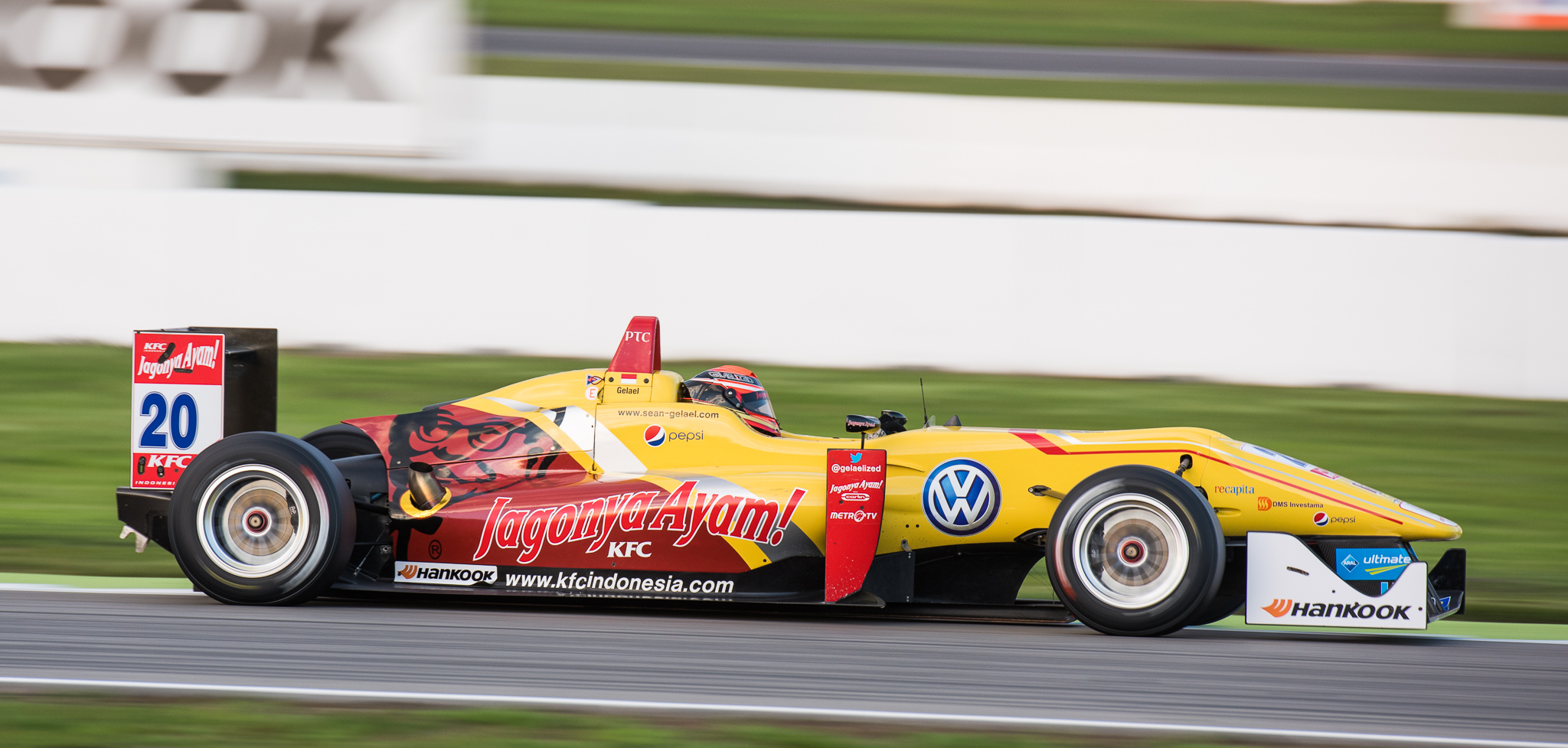 DTM,Dallara F312,Deutsche Tourenwagen Masters,F3 FIA European Championship,FIA Formel 3 Europameisterschaft,Hockenheimring,Jagonya Ayam with Carlin,Motorsport,Sean Gelael,Volkswagen